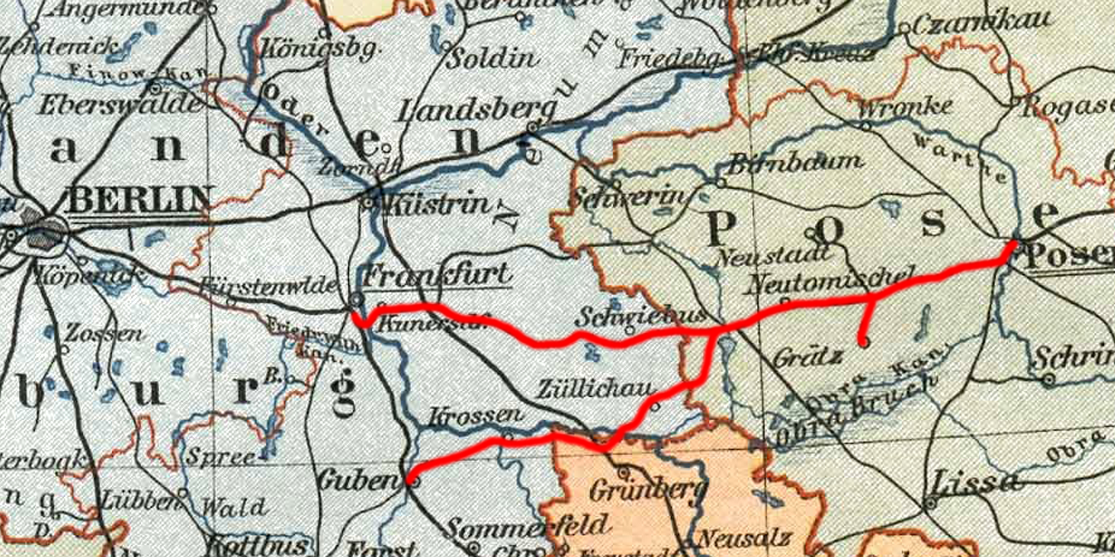 Streckennetz der Märkisch-Posener Eisenbahn-Gesellschaft, basierend auf Image:Prussia (political map before 1905).jpg